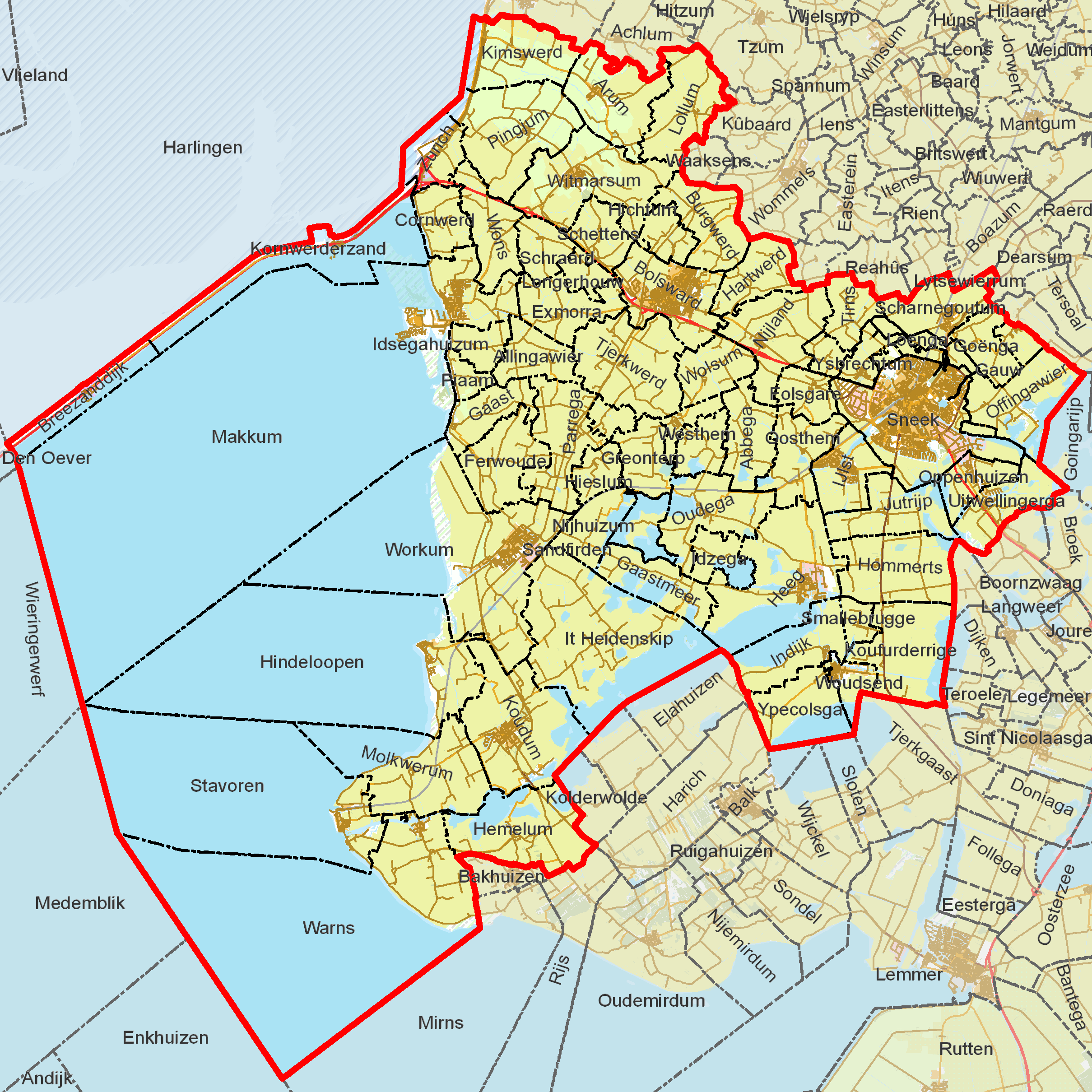 BAG woonplaatsen - Gemeente Sudwest Fryslân.png